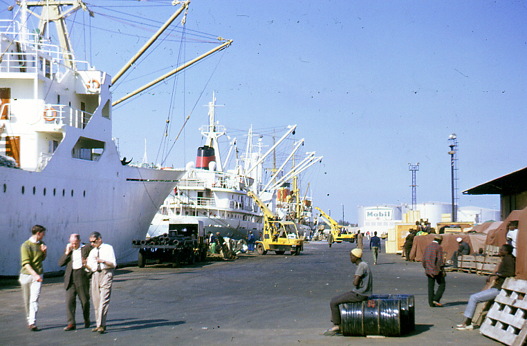 Le port de Dakar (Sénégal) en 1967